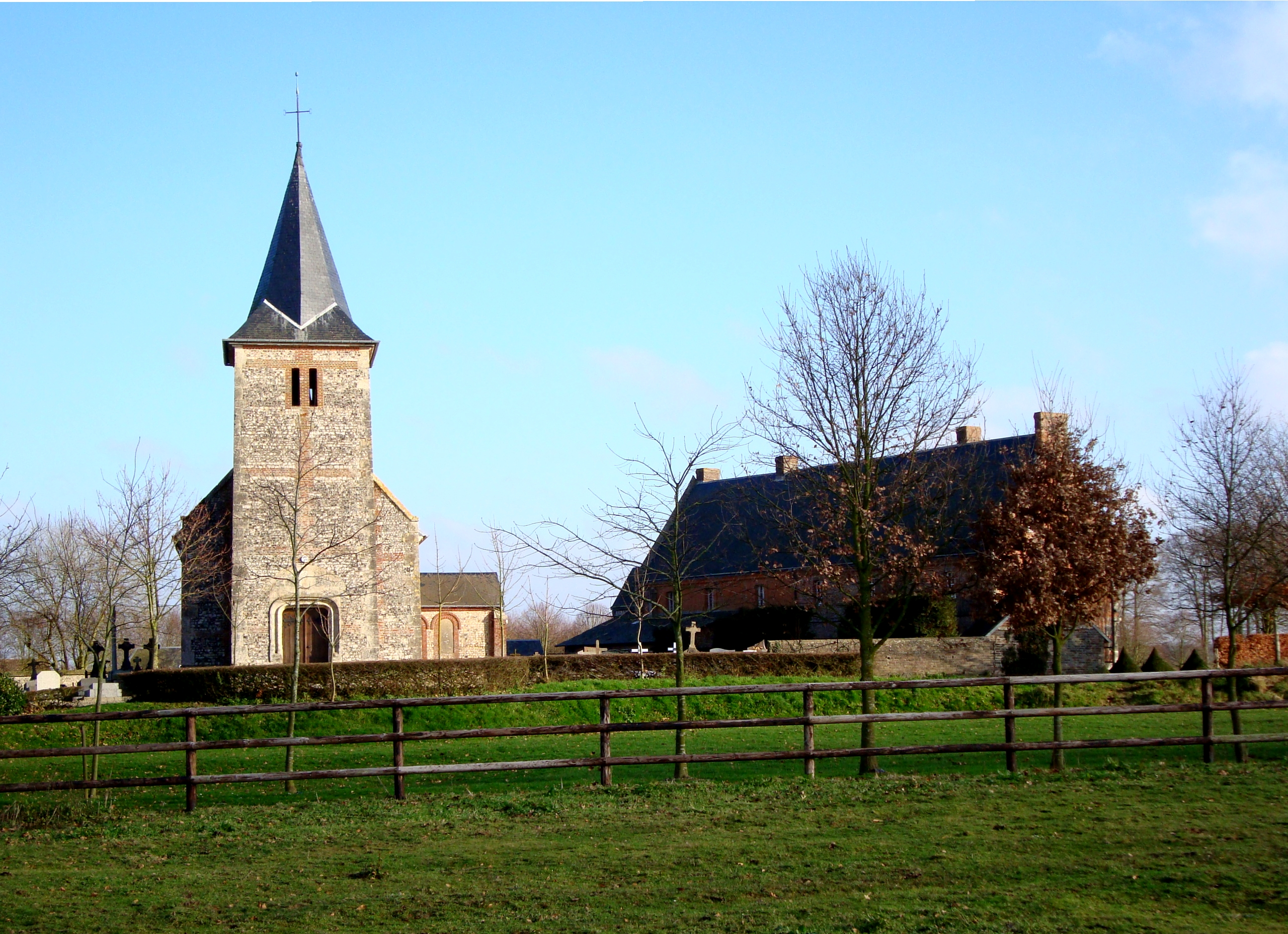 L'église et le manoir de Vertot à Bennetot (Seine-Maritime).